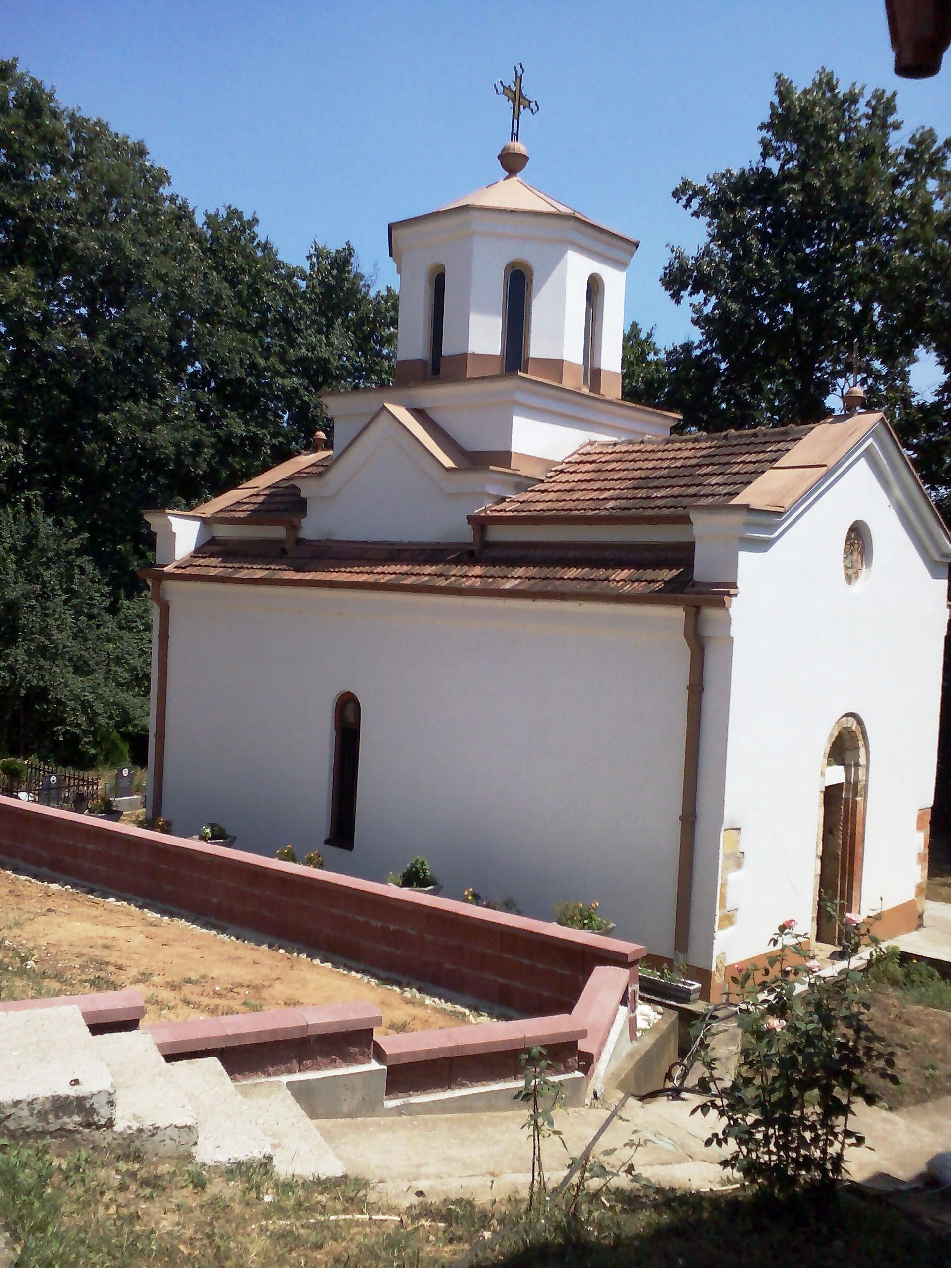 Манастир који се налази поред Велике Мораве, недалеко од села Гложане код Свилајнца